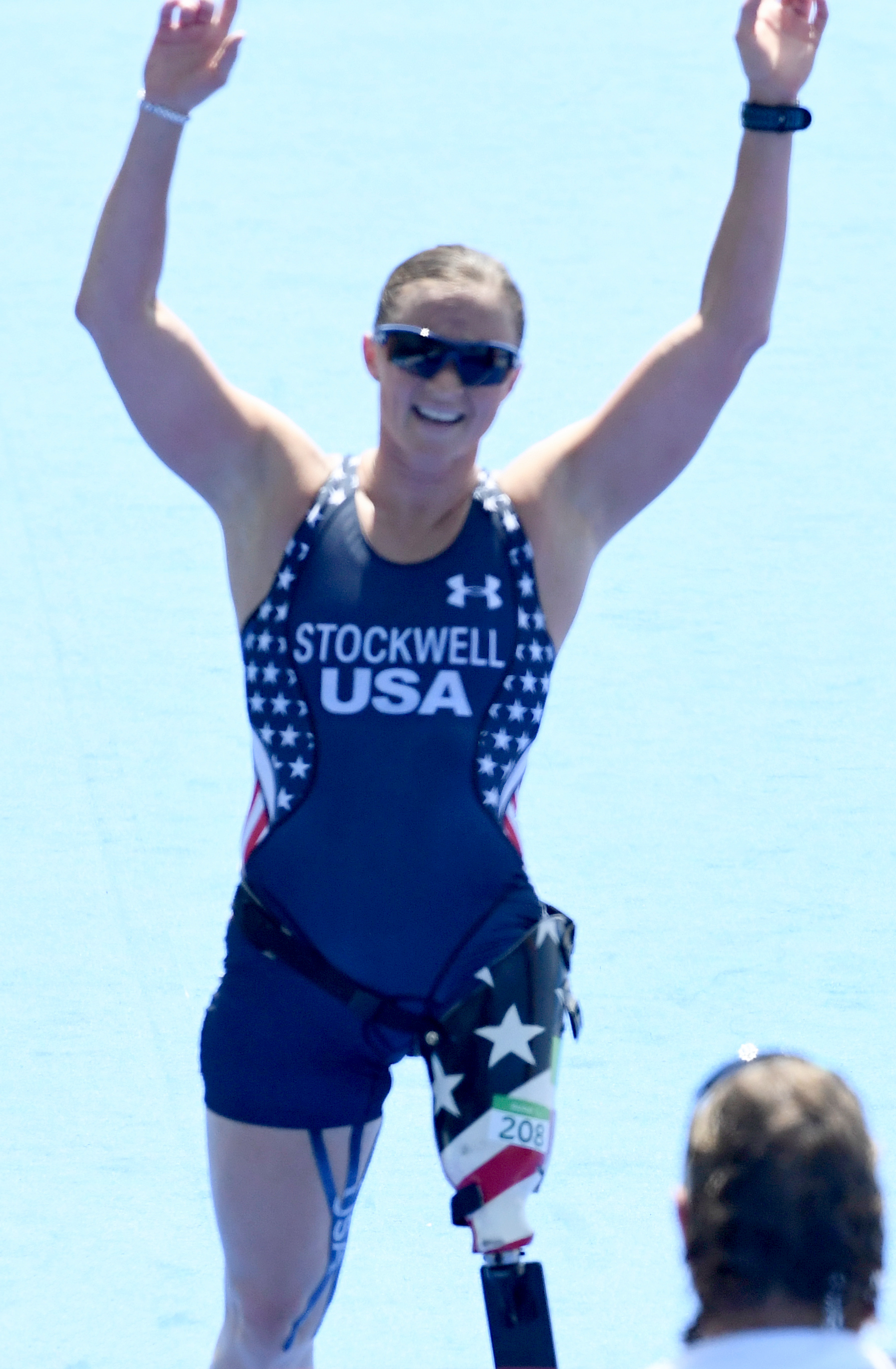 Rio de Janeiro - Provas de triatlo feminino PT4, PT2 e PT5, em Copacabana.